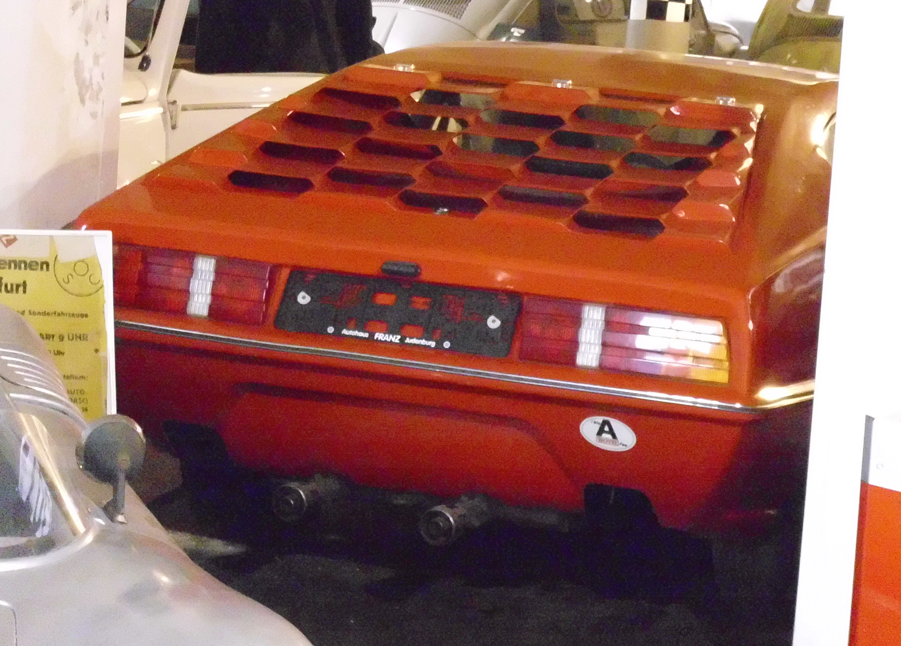 Custoca Taifun 1970–1986 im VW-Käfermuseum Gaal